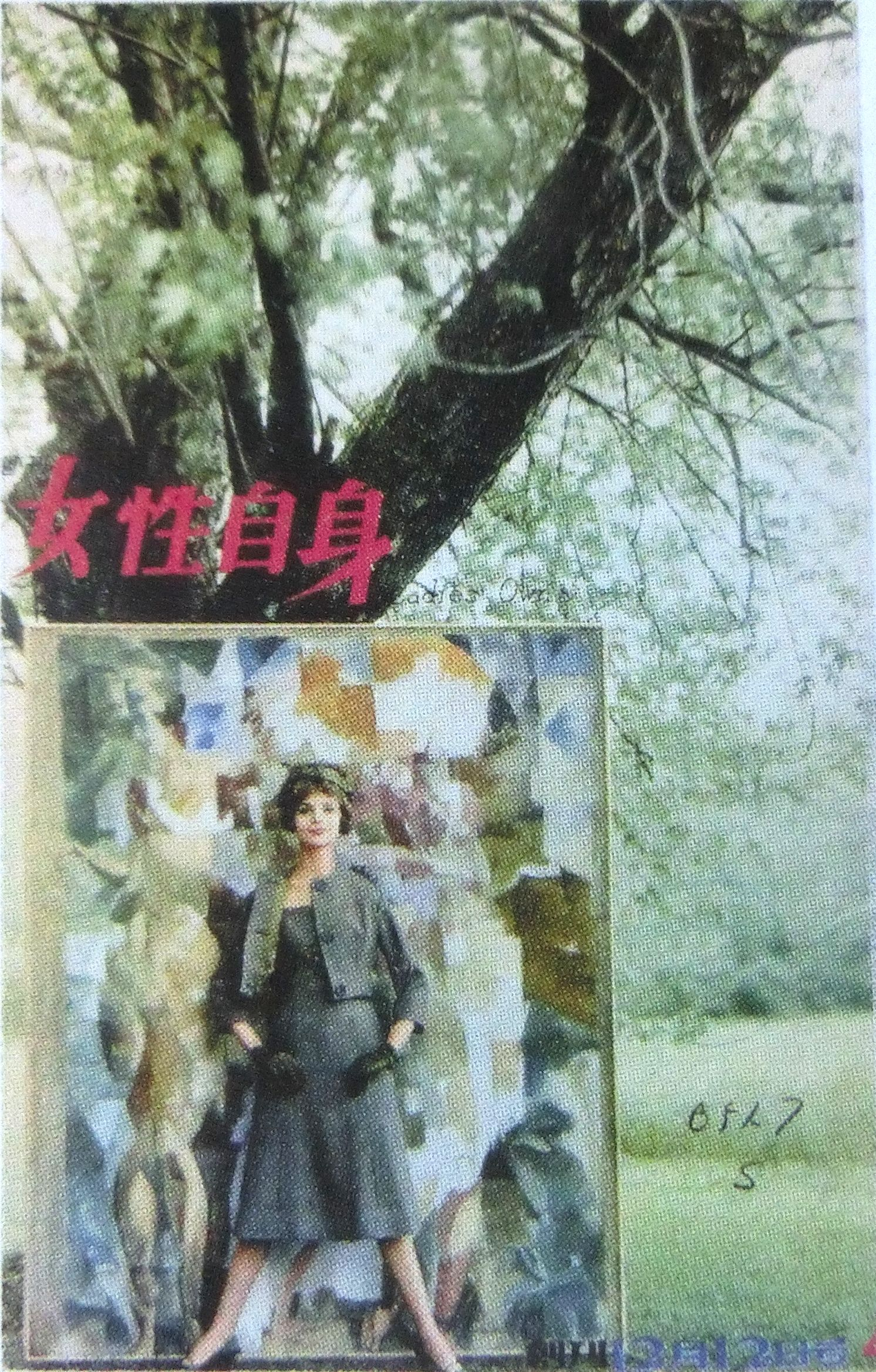 女性自身 昭和33（1958）年12月12日 、光文社